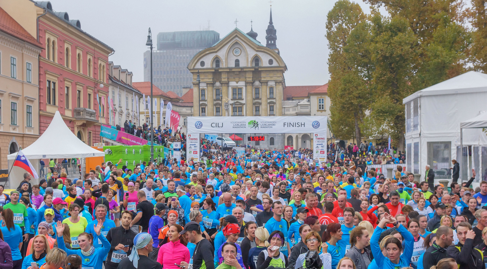 Cilj 2015